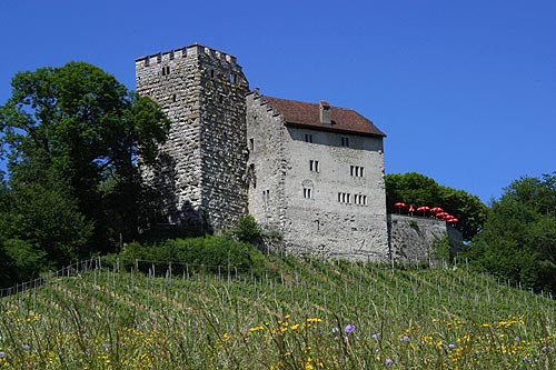 Habsburg (Nr. 03.1-5038)